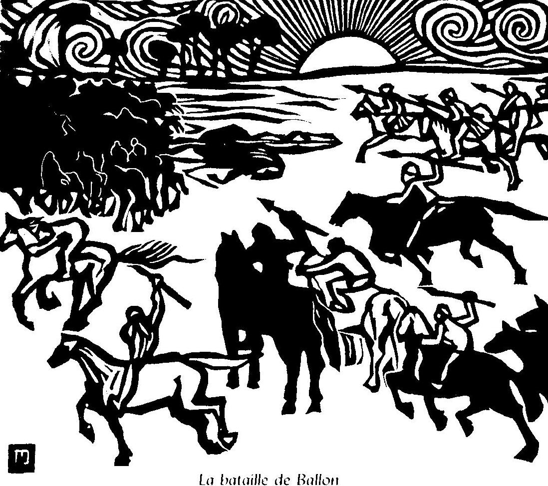 illustration from L'Histoire de Notre Bretagne, 1922